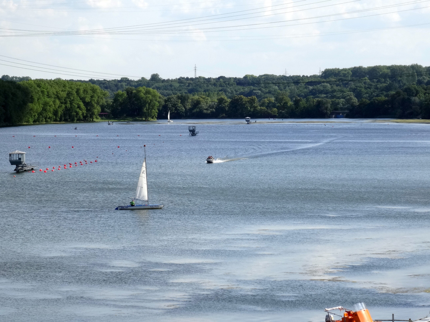 Tor regatowy w Bydgoszczy-Brdyujściu